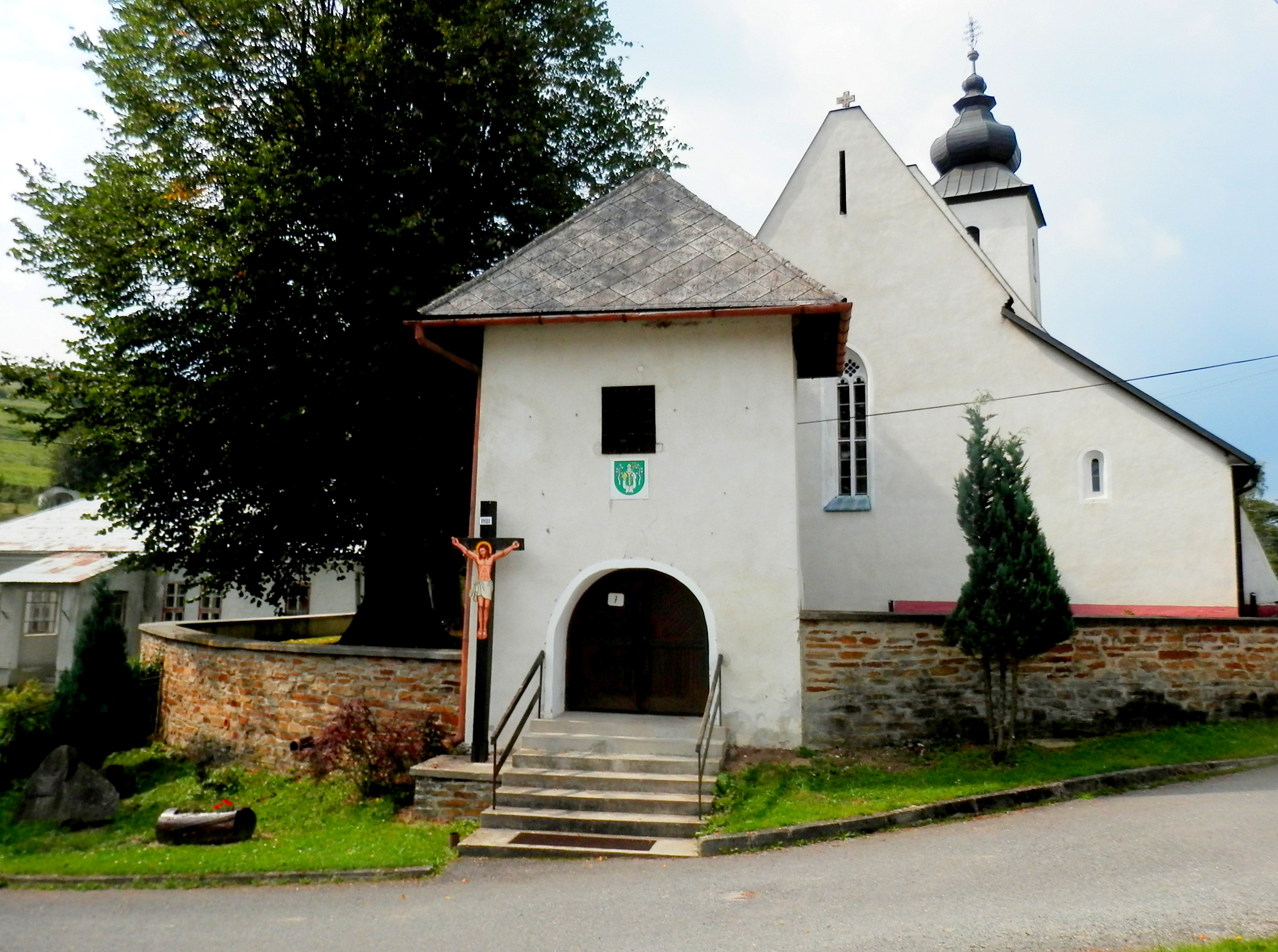 Chrám svätého Mikuláša z roku 1308. Obec Oľšavica okres Levoča.